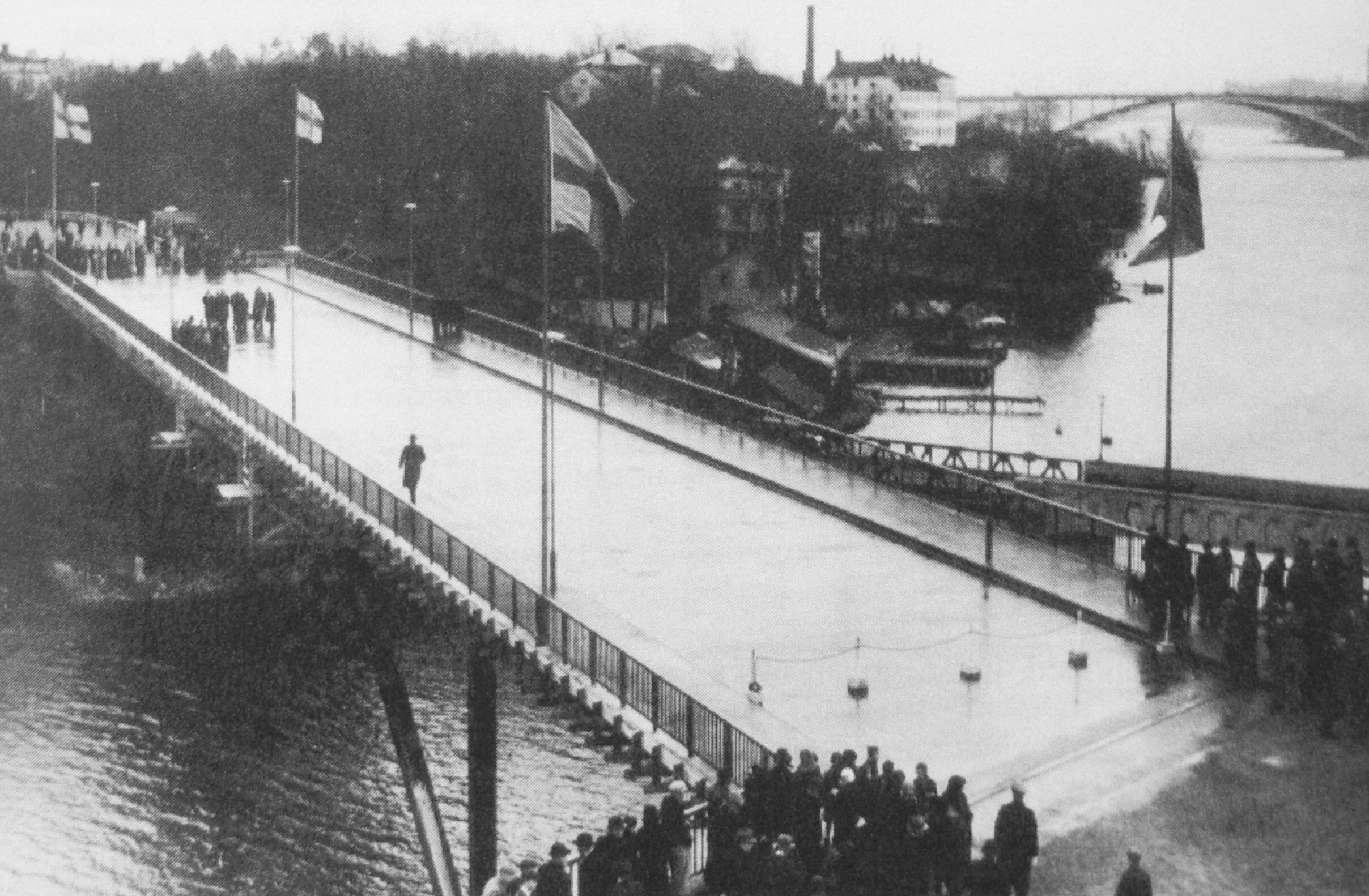 Mariebergsbron vy från Lilla Essingen